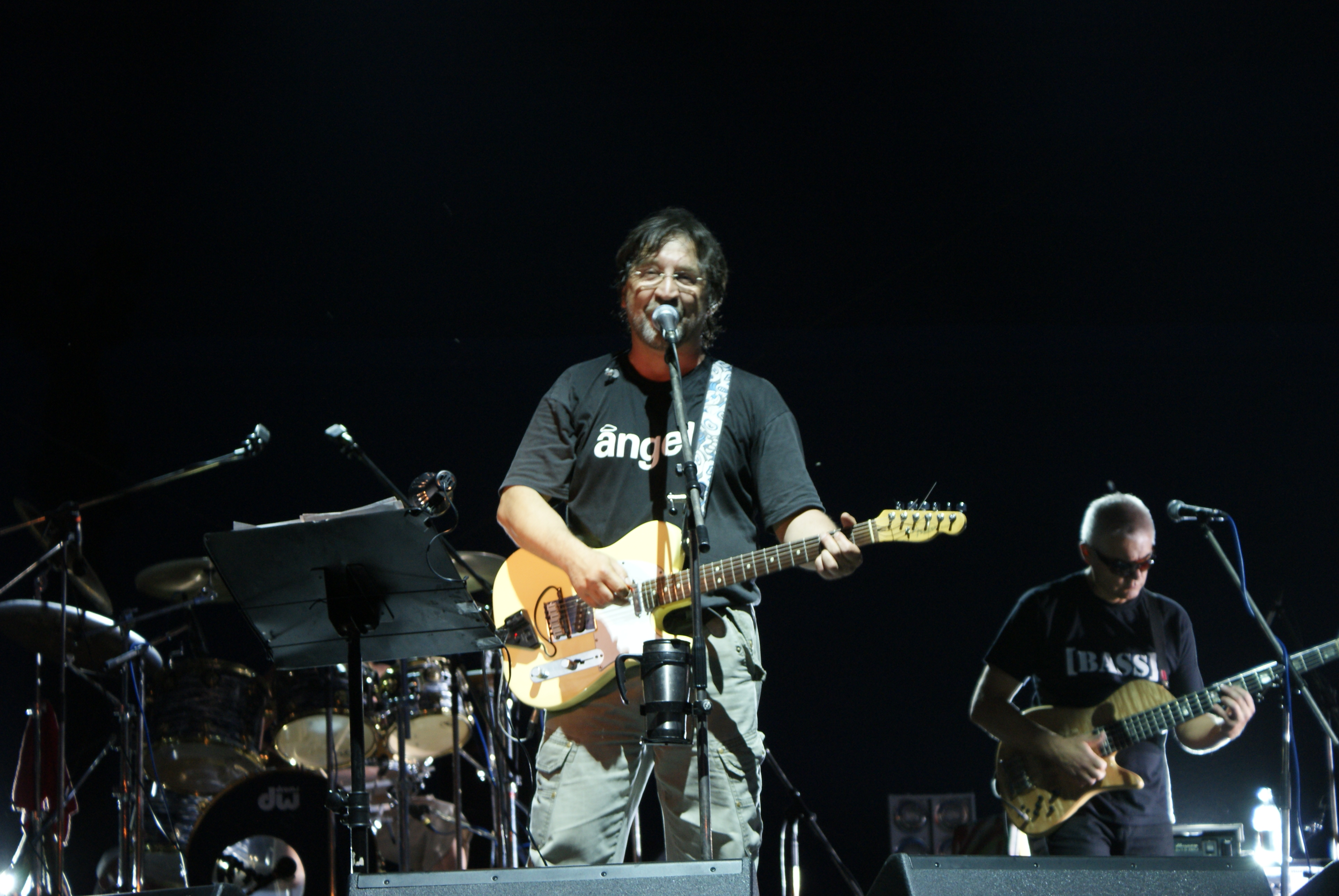 Юрий Шевчук в Могилёве